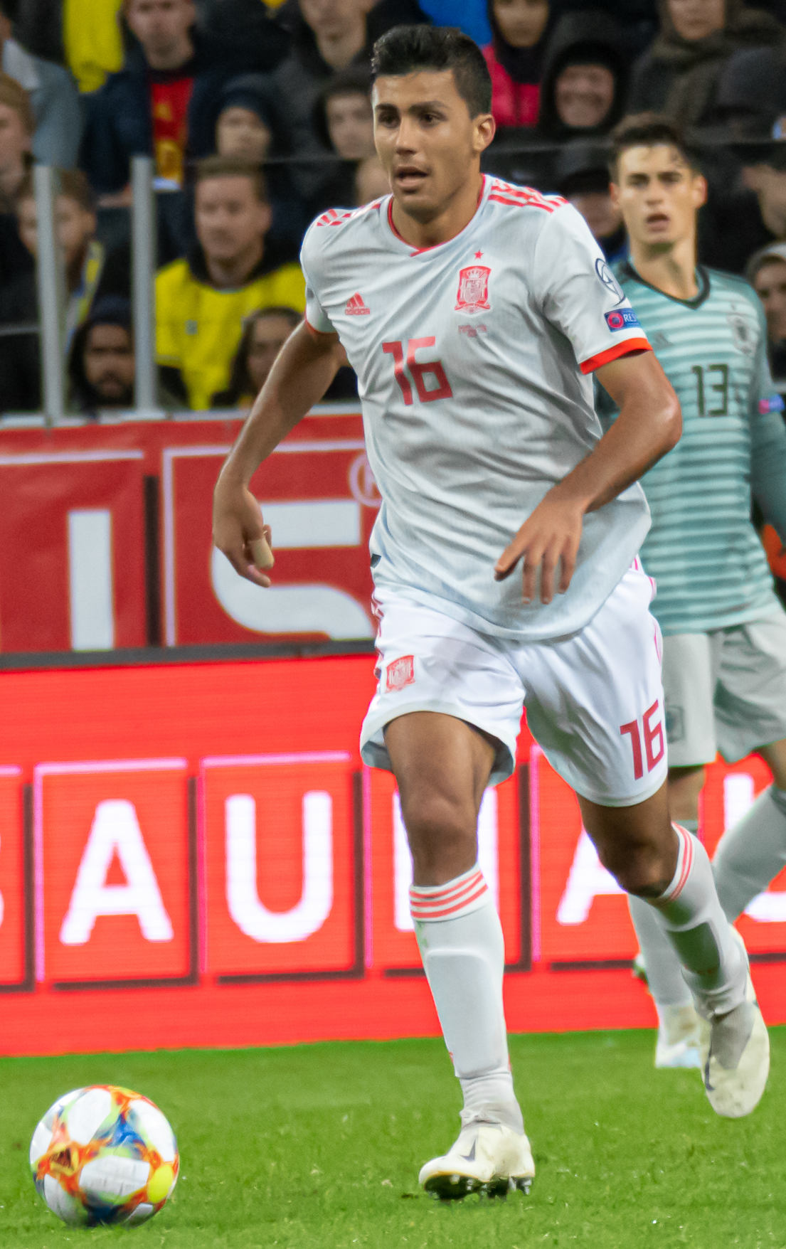 UEFA EURO qualifiers Sweden vs Spain 20191015